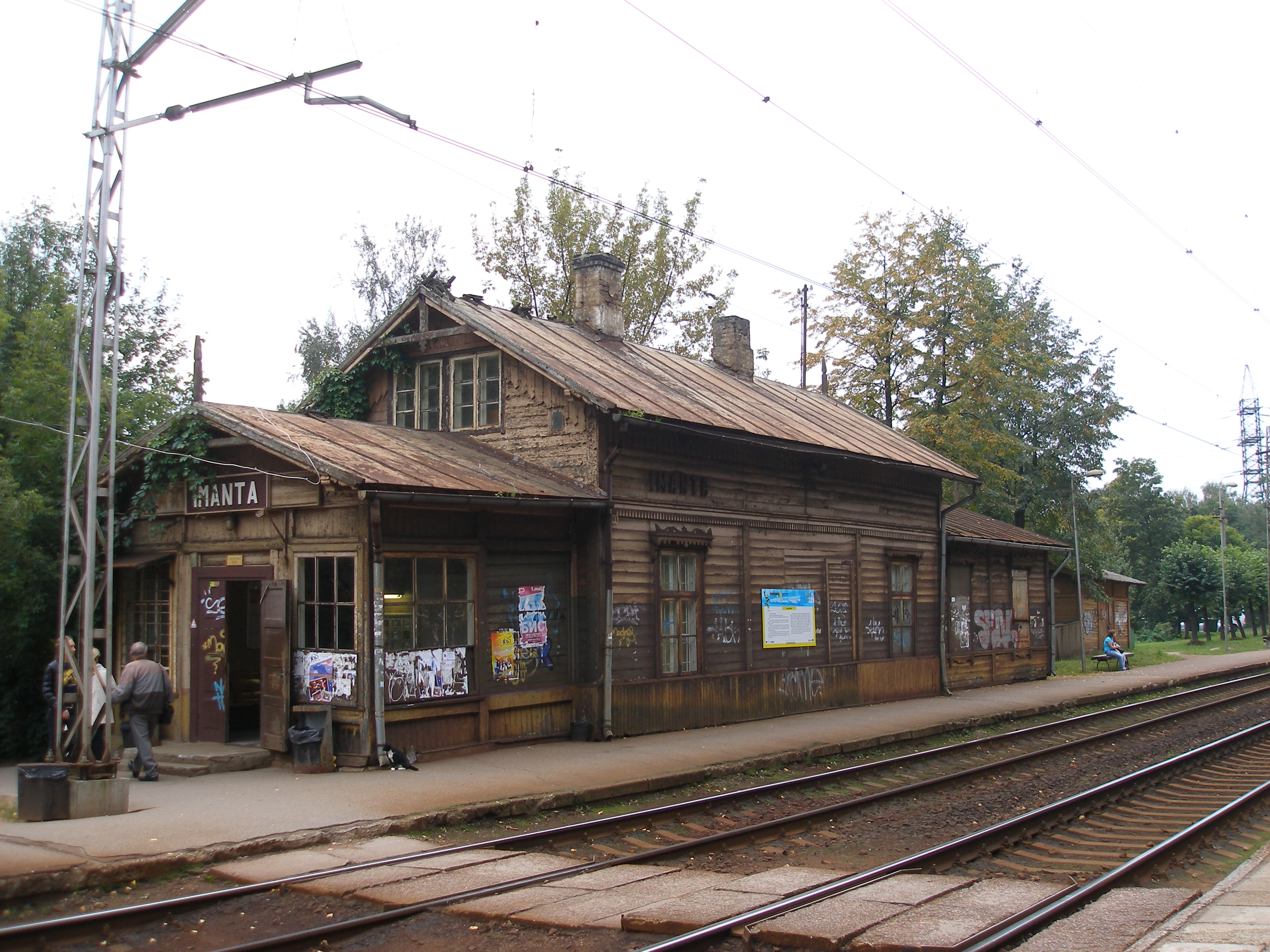 Imantas stacijas ēka 2010. gadā.